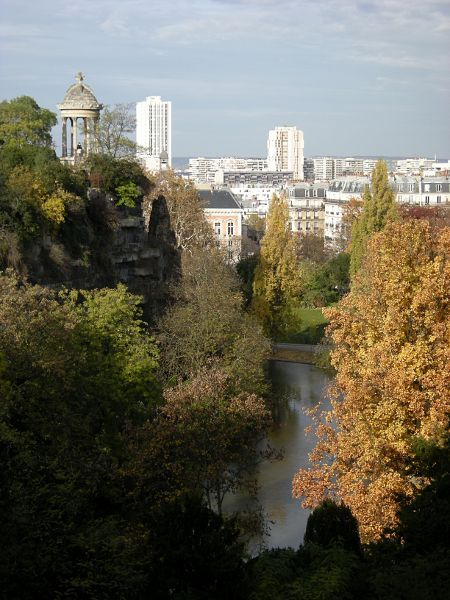 Parc des buttes Chaumont à Paris